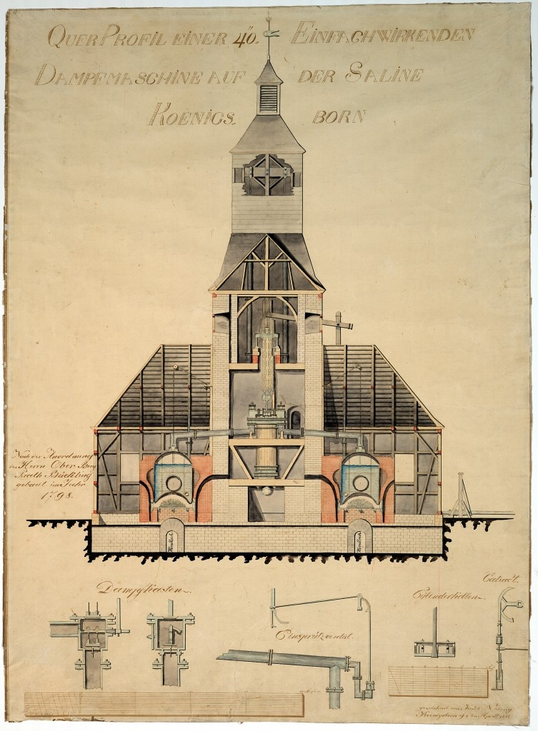 Querprofil und Details der 1799 in Betrieb genommenen Dampfmaschine auf der Saline Königsborn bei Unna, Kolorierte Tuschezeichnung,66 x 48,5 cm